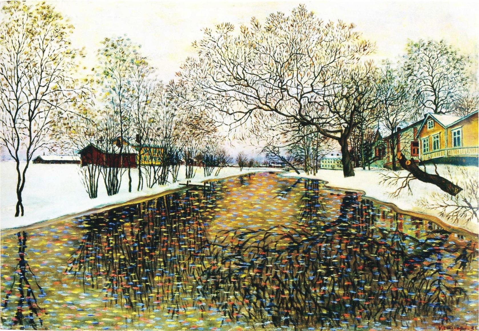 Vilho Lammen maalaus talvisesta Liminganjoesta. Kuuluu Helsingin taidemuseon omistamaan Bäcksbackan kokoelmaan.